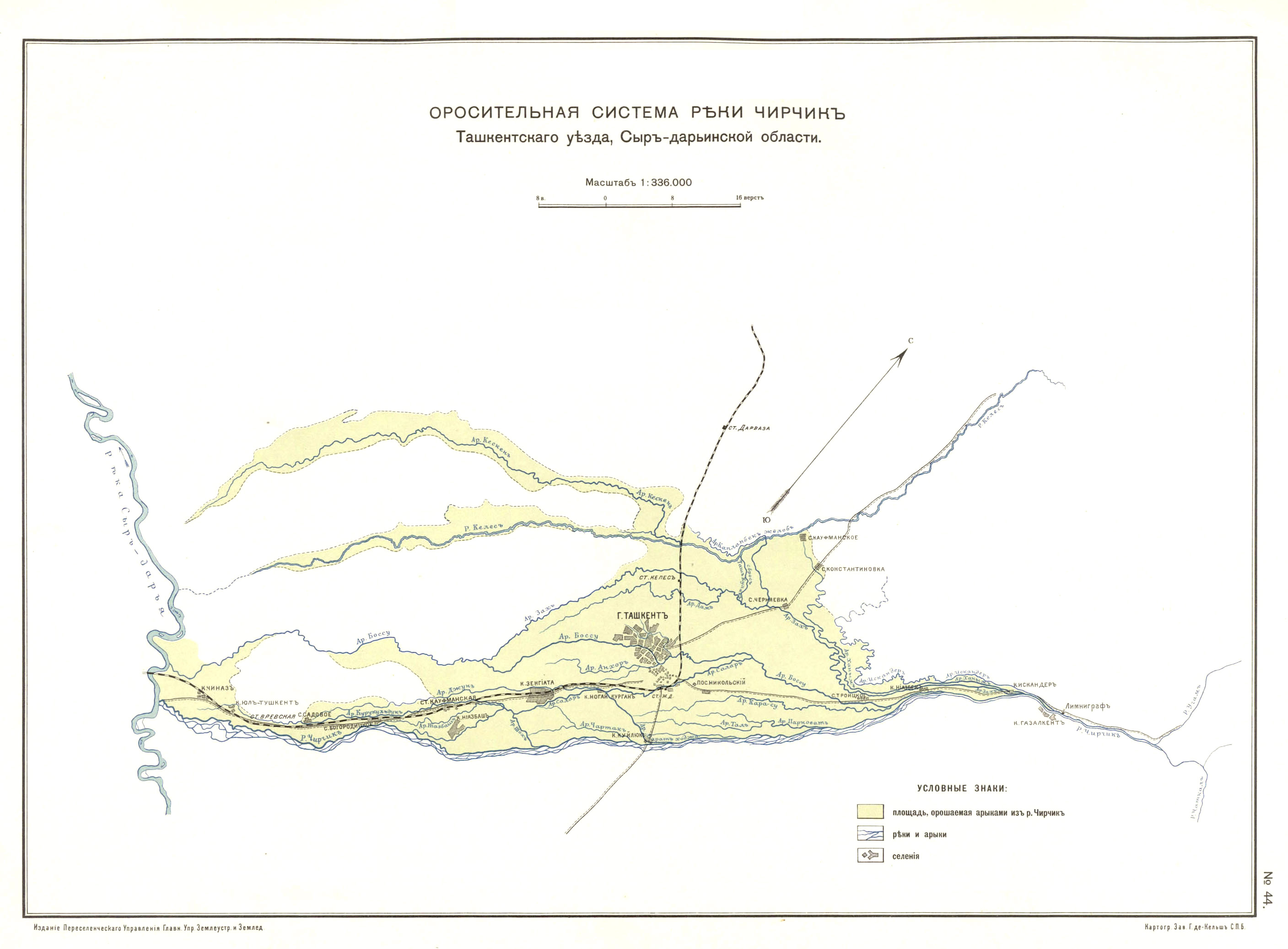 Карта - Водная система Чирчика